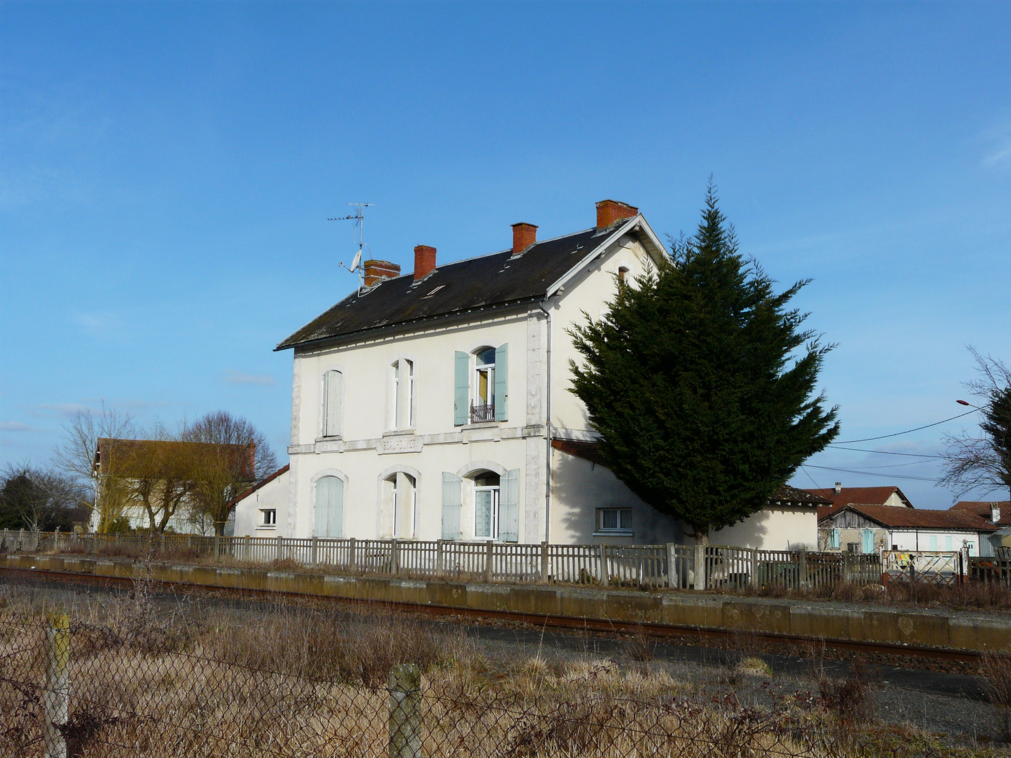 Le bâtiment de l'ancienne gare de Beaupouyet, Dordogne France.